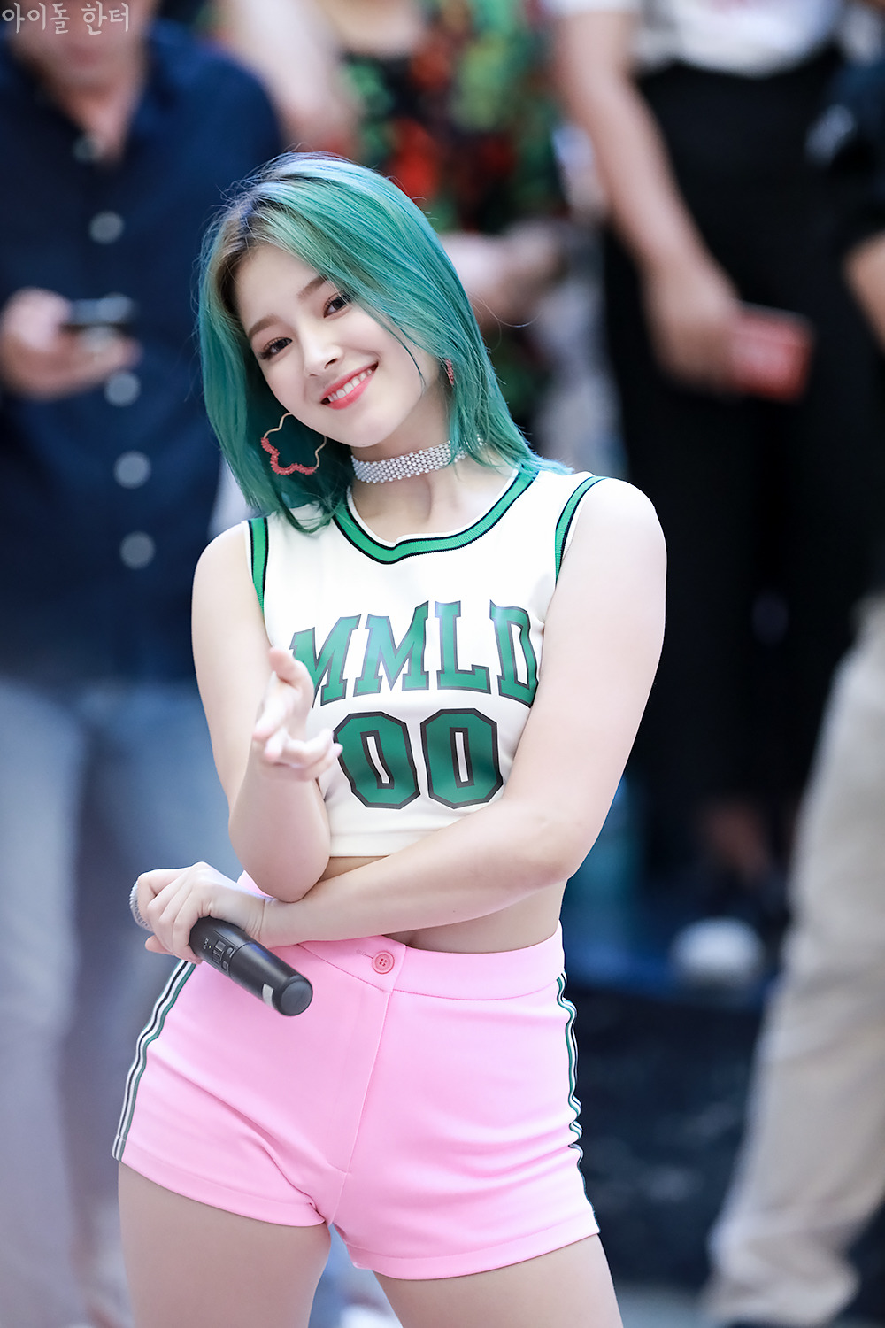 180708 낸시 게릴라 공연